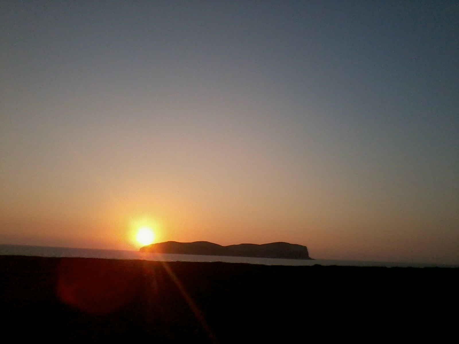 Vista desde Playa Las Liseras